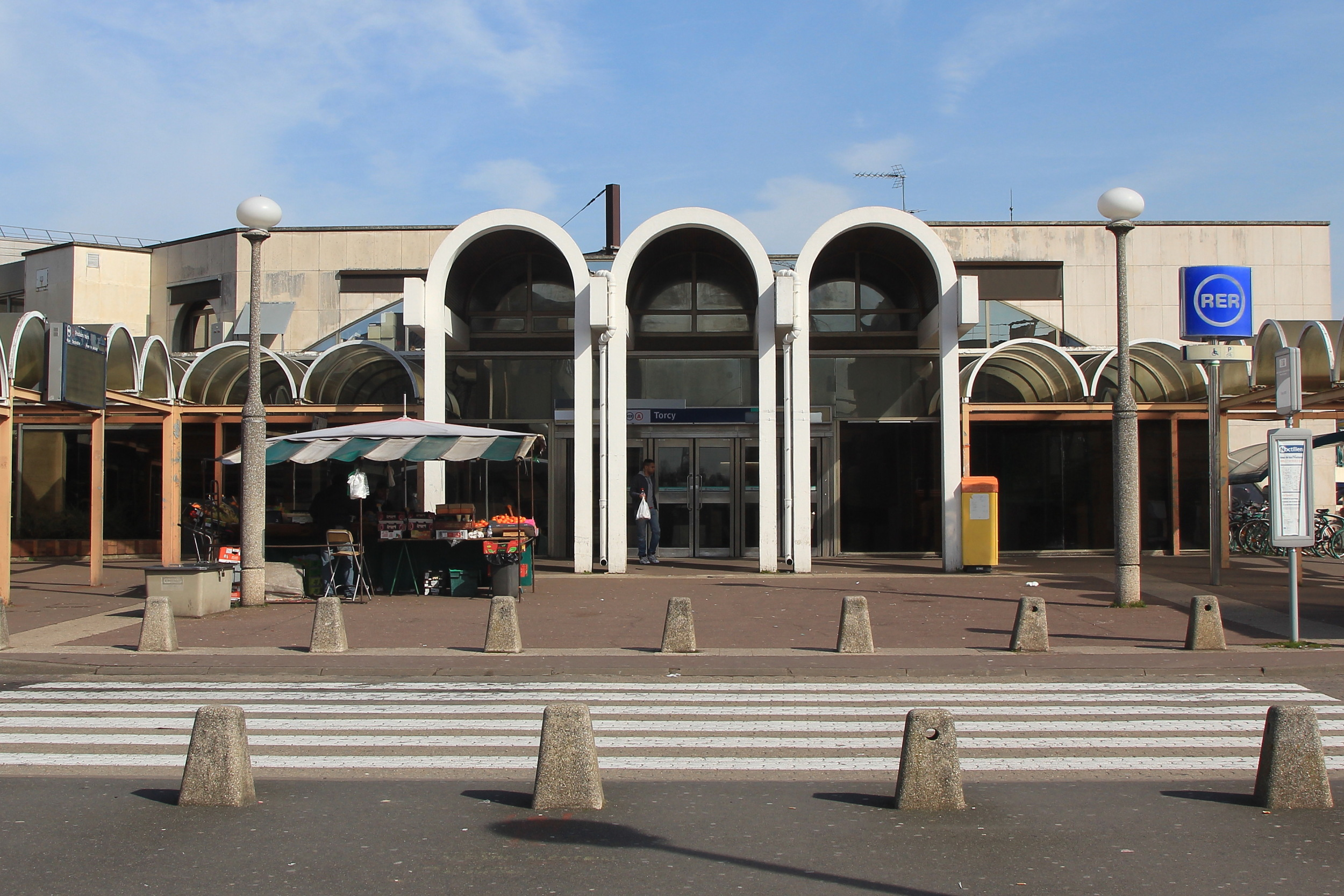 L'accès à la gare RER de Torcy côté sud. Il s'agit de l'accès historique construit en 1980.